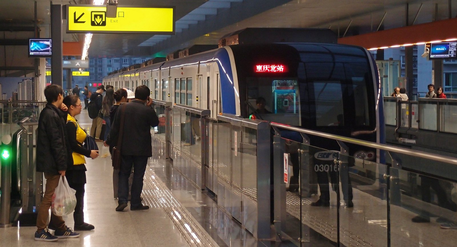 Chongqing Monorail Station